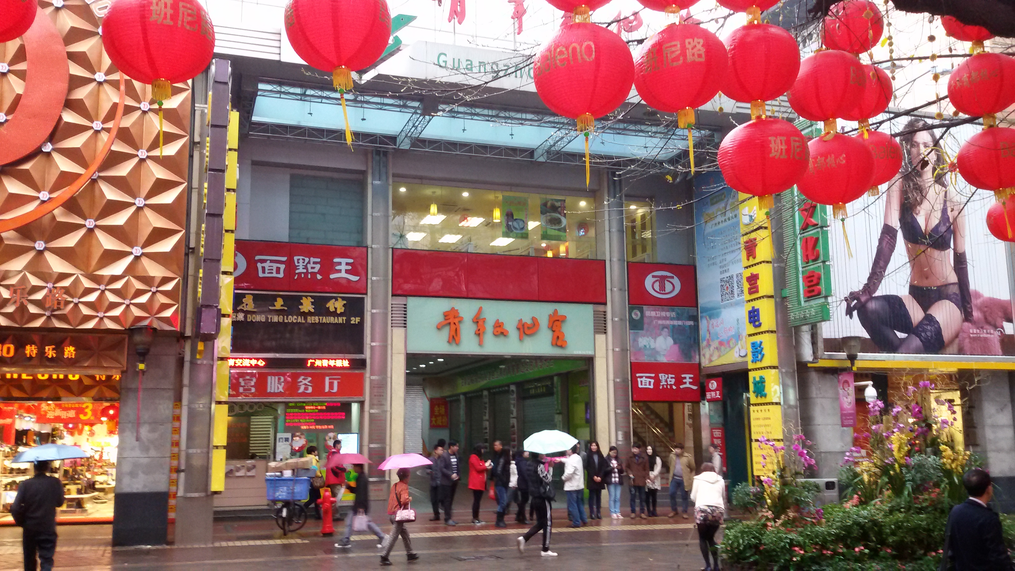 粵語: 廣州青年文化宮